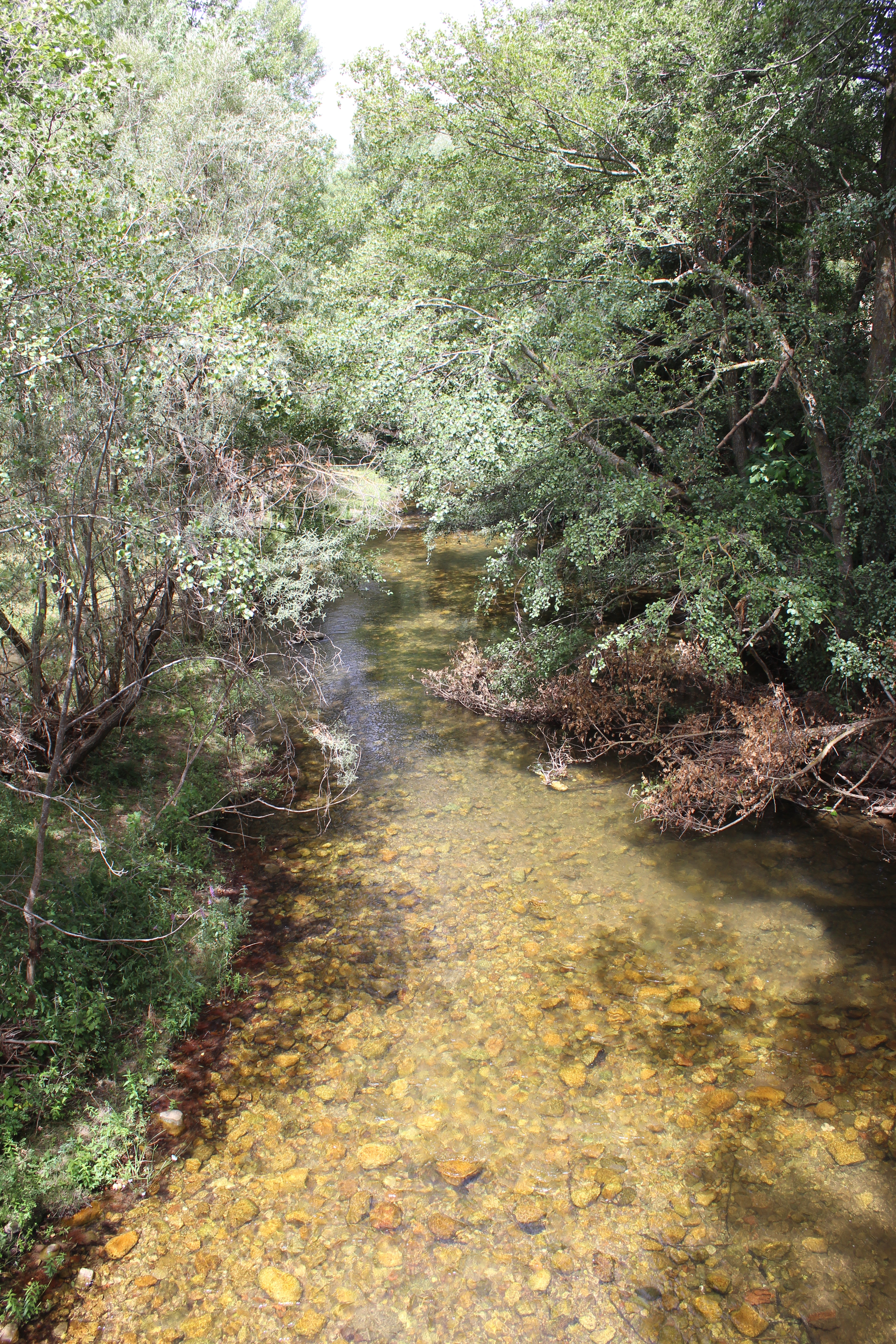 Curso bajo del río Sorbe (junto a la CM-101), Humanes, provincia de Guadalajara.